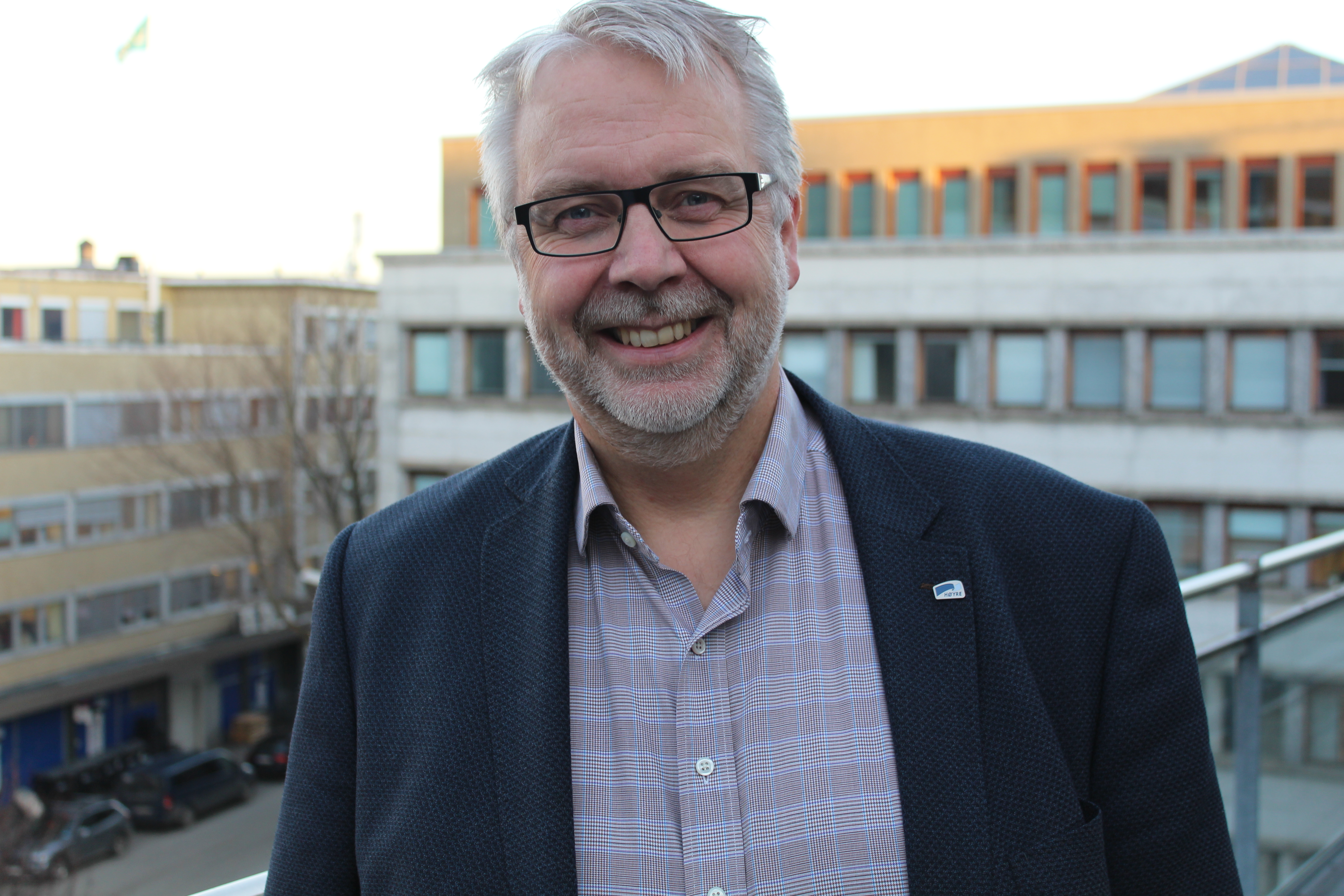 Pål Sæther Eiden, Høyres gruppleder i Trøndelag fylkesting, i 2018.